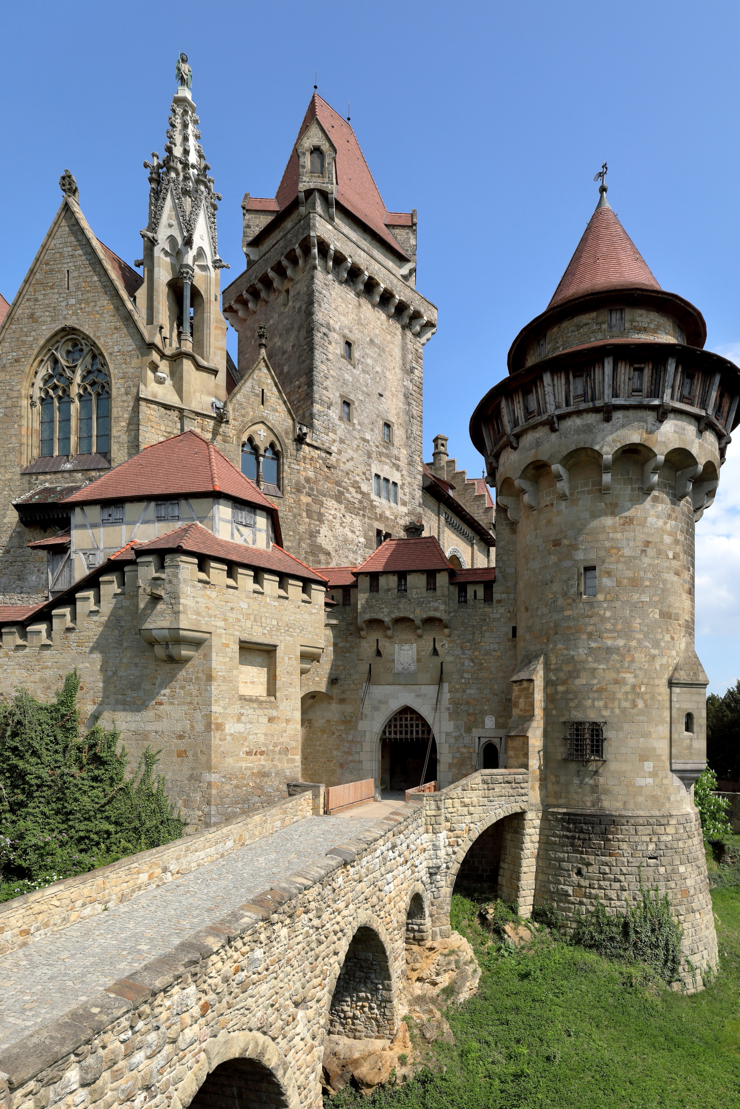 Westansicht der Burg Kreuzenstein in der niederösterreichischen Marktgemeinde Leobendorf. Die ursprüngliche Burg wurde im Zuge des 30-jährigen Krieges zerstört und anschließend als Baumaterial großteils abgetragen. Unter Graf Johann Nepomuk Wilczek erfolgte von 1874 bis 1906 ein Wiederaufbau der Burg als Museum für seine umfangreichen Kunstsammlungen. Die so entstandene Schauburg ist heute, ergänzt durch zahlreiche wiederverwendete mittelalterliche Bauteile und nach teilweiser Beseitigung der Brandschäden von 1915 und der Kriegsschäden von 1945, ein beliebtes Tourismusziel nördlich von Wien.